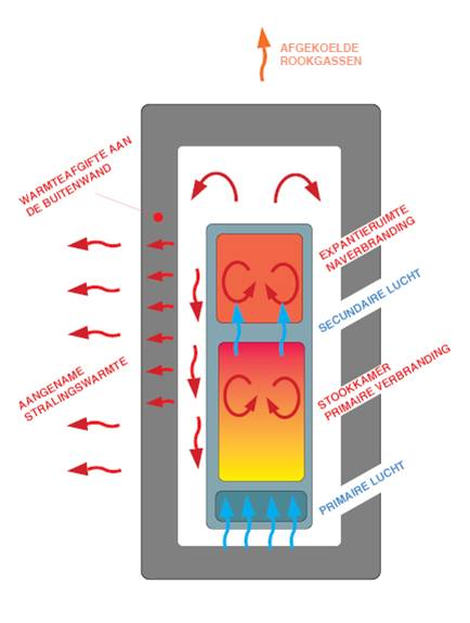 Werking van een finkachel